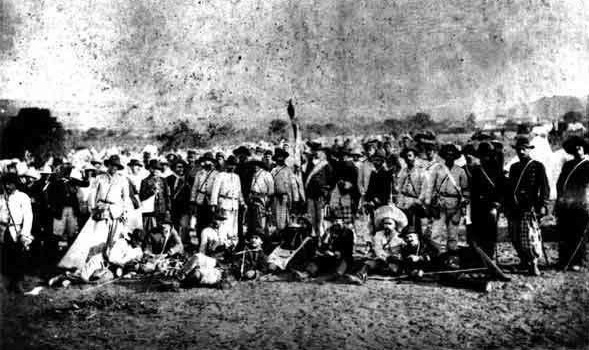 1º e 2º Corpos do Regimento Militar Paraense em Canudos (Bahia, Brasil, 1897)